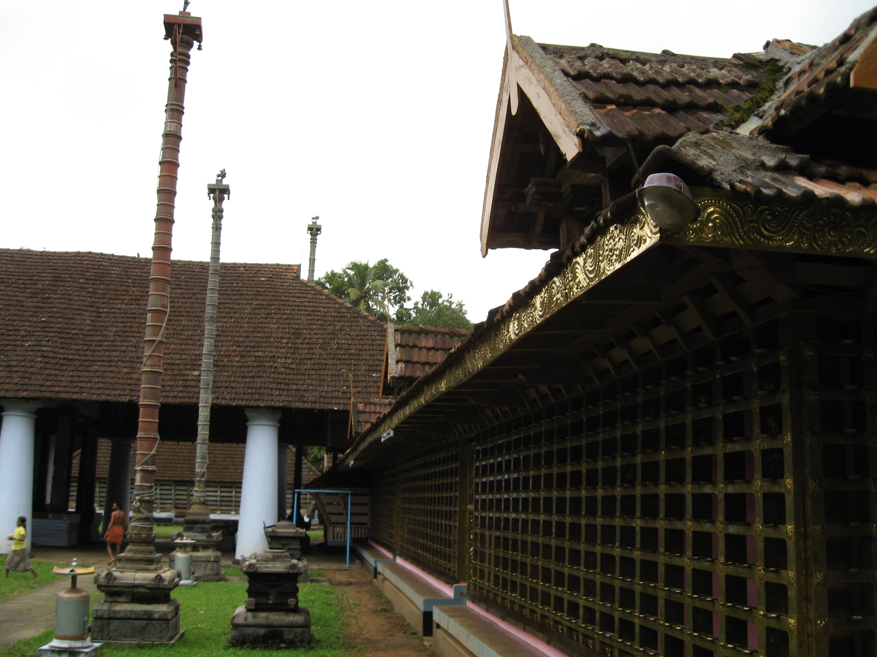 Thiruvegappura Temple 01